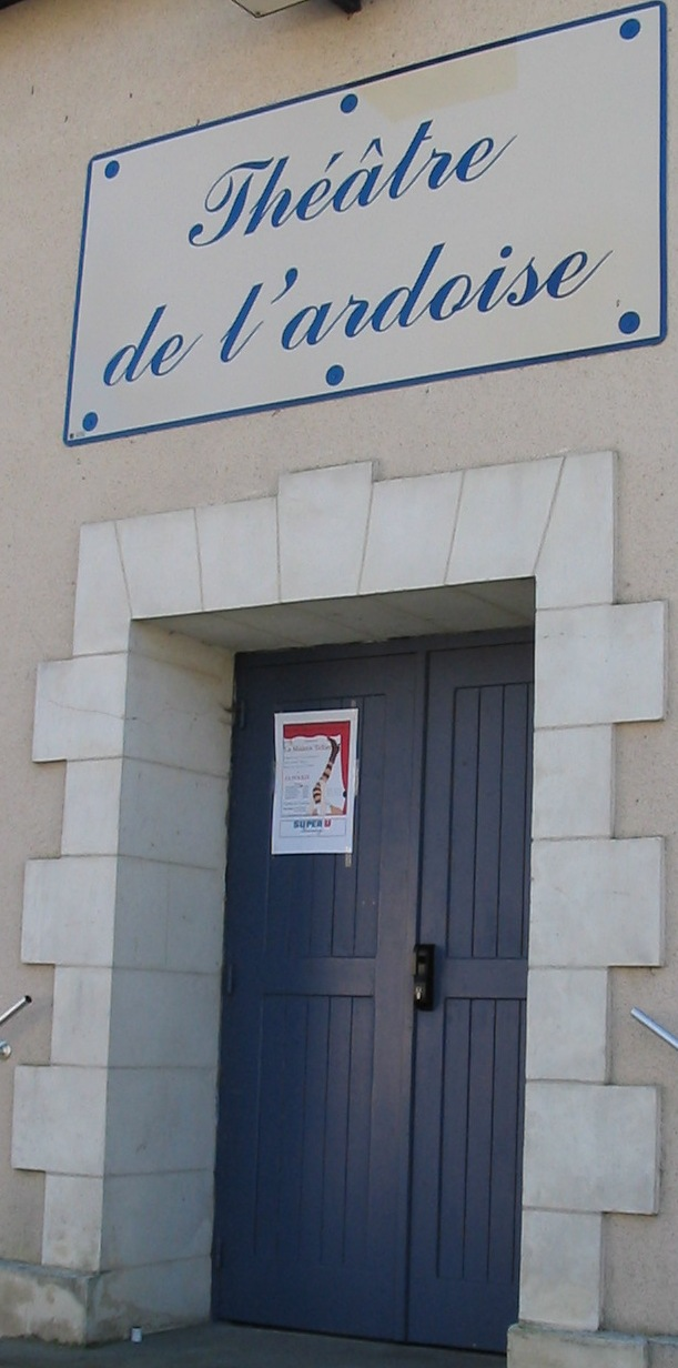 Le théâtre de l'ardoise, salle municipale, la Pouëze en Maine-et-Loire